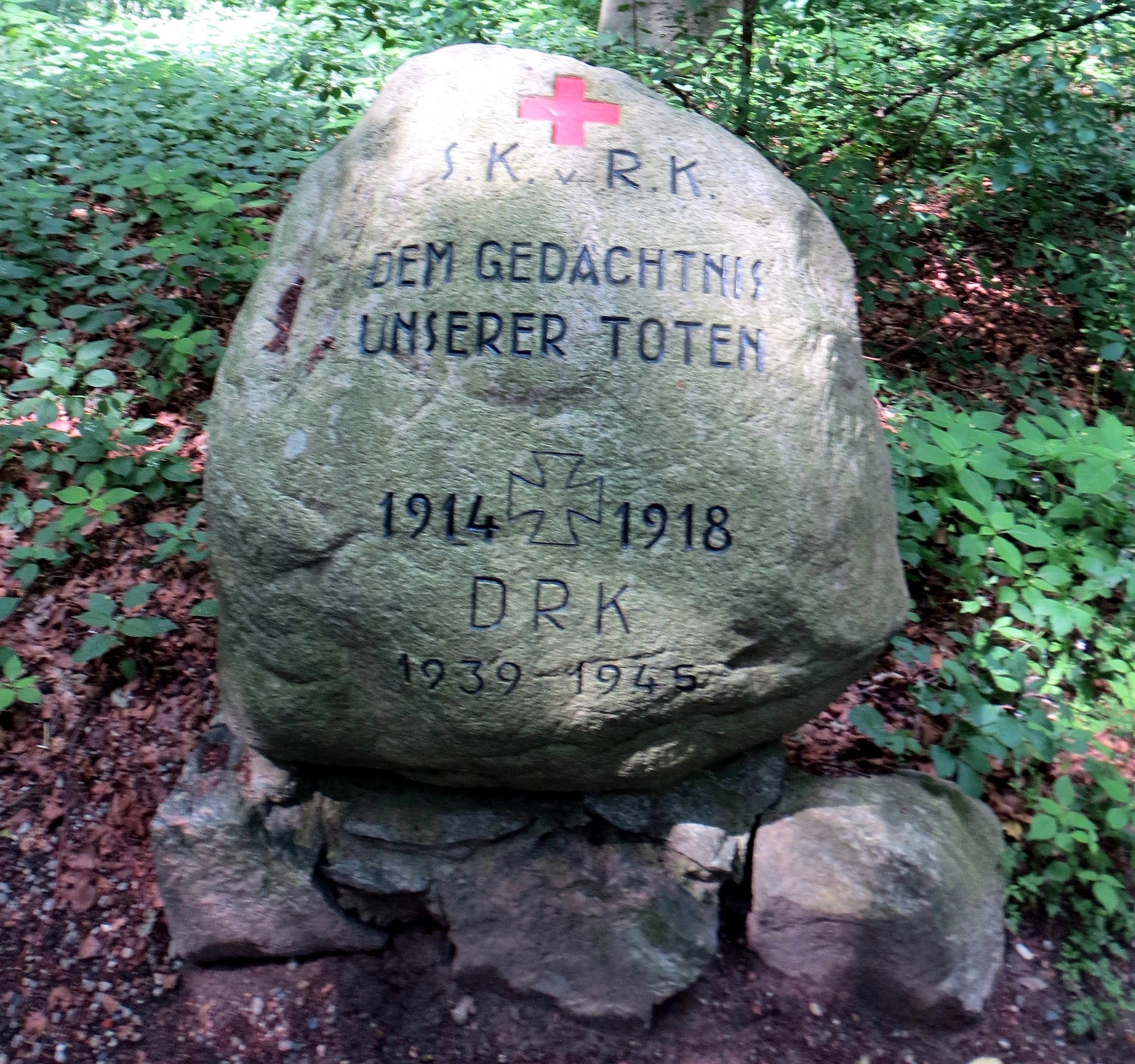 Sanitätskolonne vom Roten Kreuz (S. K. v. R. K.) auf dem Lübeckischen Ehrenfriedhof